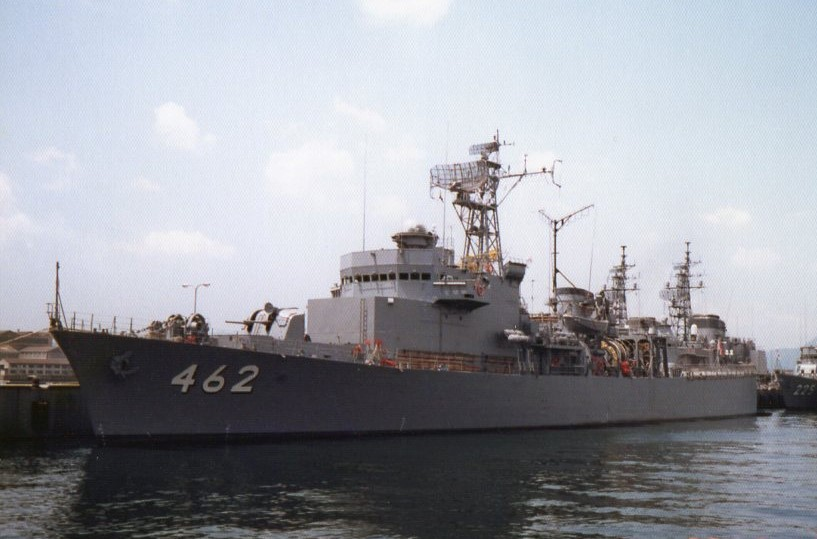 呉港に停泊中の掃海母艦「はやせ」。